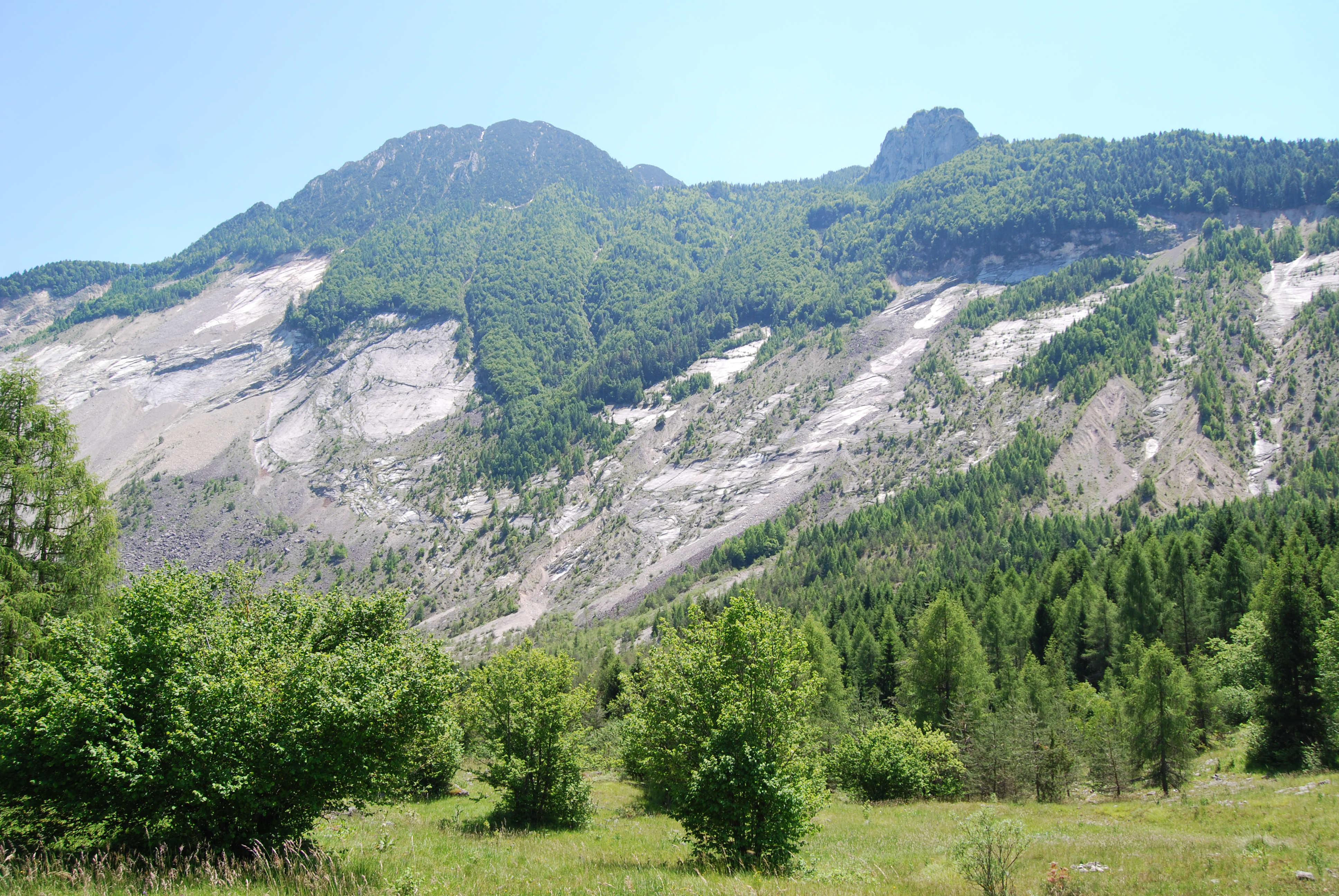 Il monte Toc, visto dalla valle del Vajont